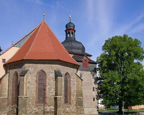 Unterkirche in Bad Frankenhausen, Mai 2005